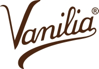 Damaliger Schriftzug der Vanilia-Hosen